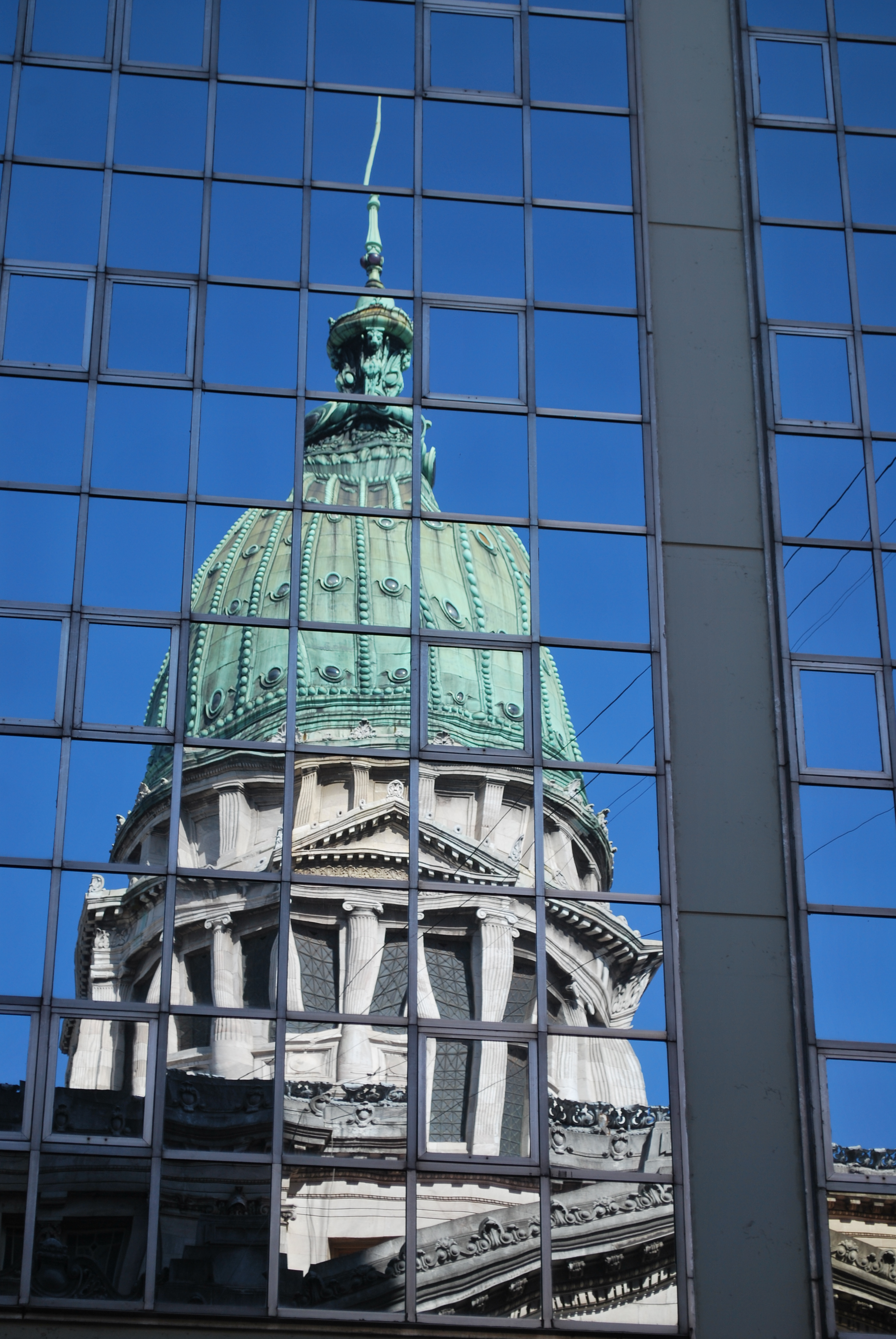 Reflejada en el anexo del Congreso de la Nación.